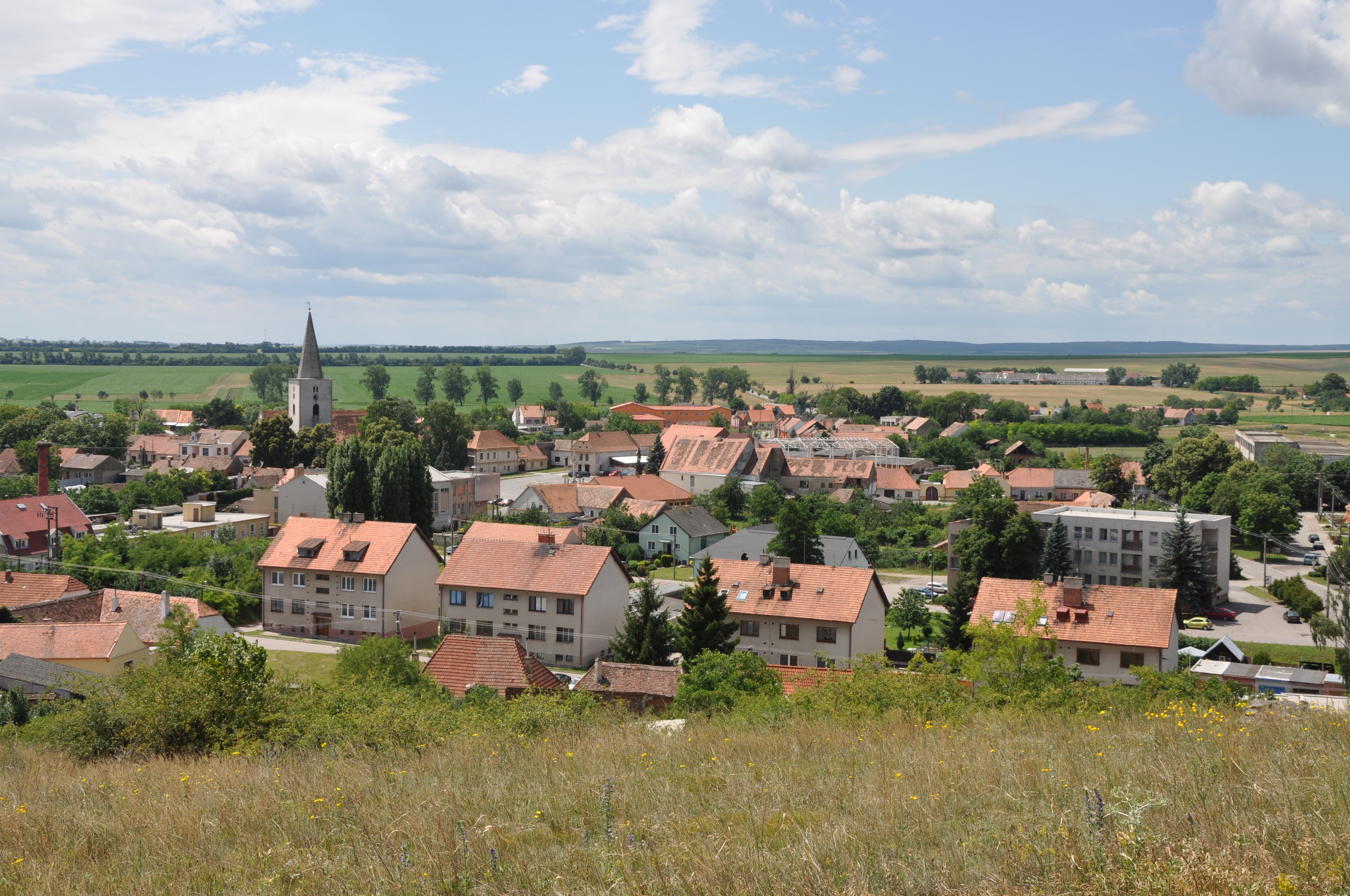 Hostěradice z PP U kapličky